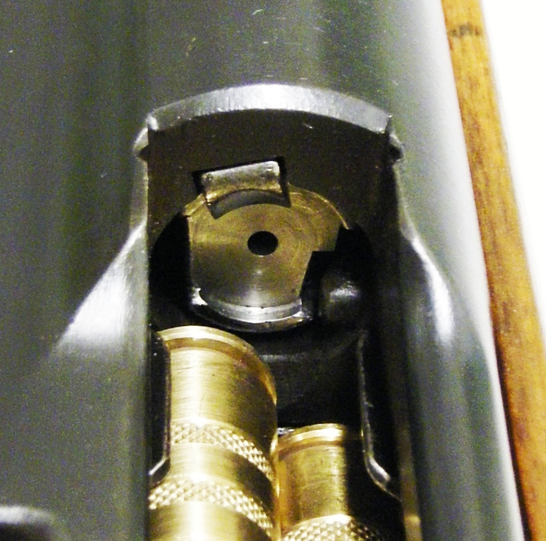 Ejecteur du mousqueton 1911